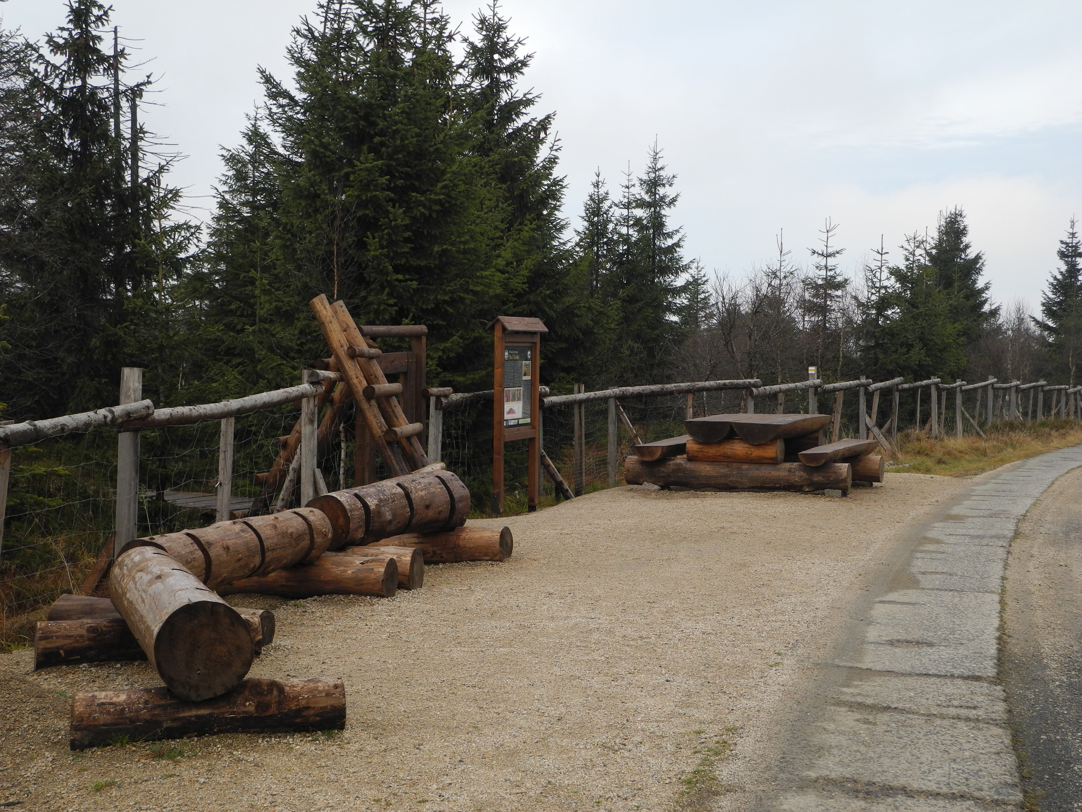 Přístupová cesta ze Štolpišské silnice